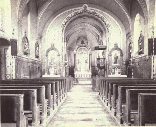 Innenansicht der Evangelischen Stadtpfarrkirche in Vohenstrauß vor 1929 (mit Nebenaltären und Kreuzweg)